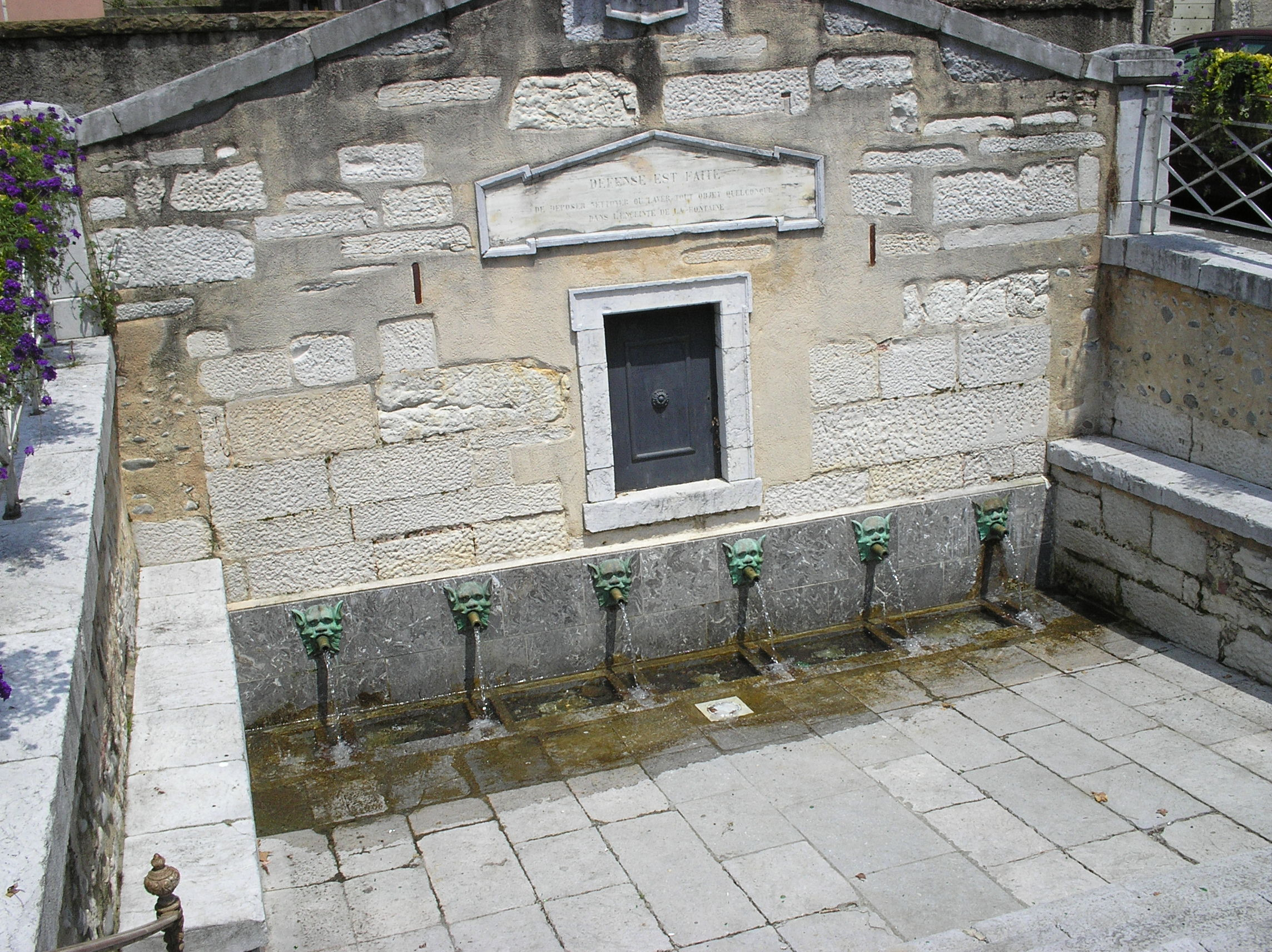 Fontaine du ravin du Hédas à Pau